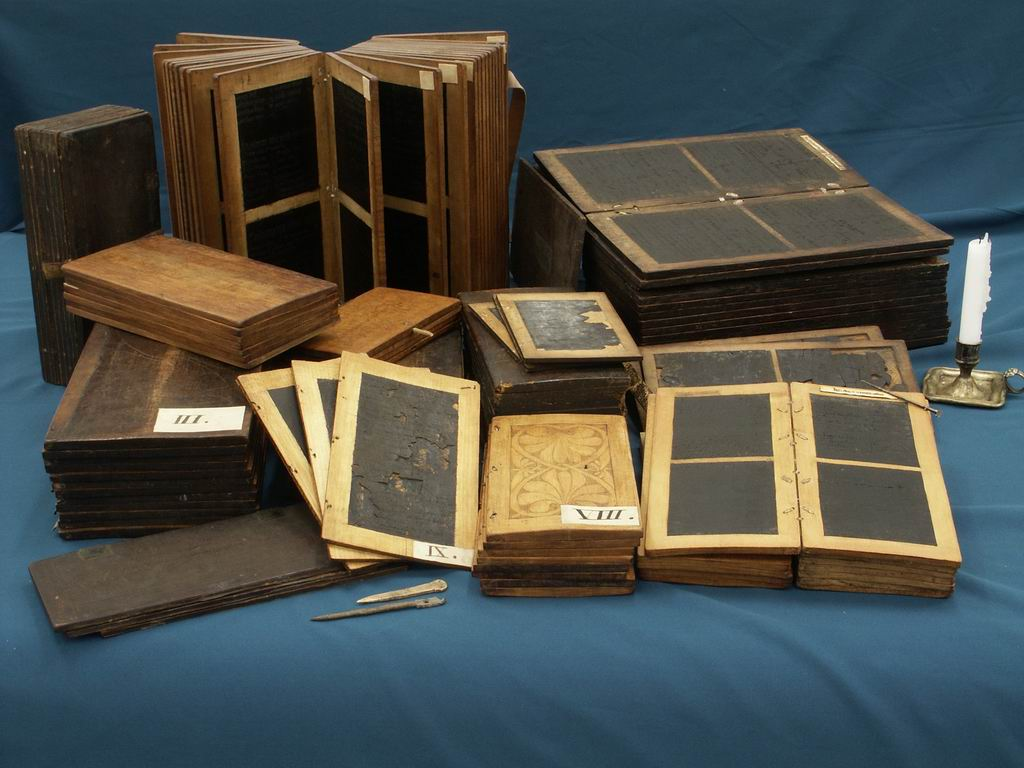 Zbiór tabliczek woskowych miasta Torunia – zapisy dotyczące głównie finansów miejskich i wszelkiego rodzaju transakcji zawieranych przez mieszczan (czynszów od urządzeń targowych i przemysłowych, gruntów i różnorodnych rent); rozliczenia wzajemnych zobowiązań, różne formy spłaty długów; wilkierze i uchwały rady miejskiej. Opis zewnętrzny: Oryginały, jęz. niemiecki; 16 poliptyków, utworzonych ze 127 deseczek wykonanych z drewna gruszy, jabłoni, lipy, jaworu i dębu; poszczególne deseczki połączone są od strony grzbietu rzemieniami lub sznurkami. Całość zabezpieczona jest drewnianymi okładkami (drewno wiśni, jesionu i gruszy), często ozdobionymi ornamentem roślinnym i zoomorficznym. Na oprawach wyryte są m.in. chimery, gryfy, bazyliszki, centaury i smoki. Wymiary deseczek są zróżnicowane i wynoszą: maksymalnie 41,7 x 21,7 cm (długość i szerokość), minimalnie 25,5 x 13,2 cm. Grubość deseczek waha się od 1,2 do 0,5 cm. Miejsce przechowywania: Archiwum Państwowe w Toruniu, Akta miasta Torunia, Kat. II, sygn. XVI-1 Autor komentarza: Beata Herdzin, Witold Szczuczko Autor fotografii: Artur Bal